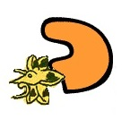 Escritura Gráfica del nombre Xicotencatl